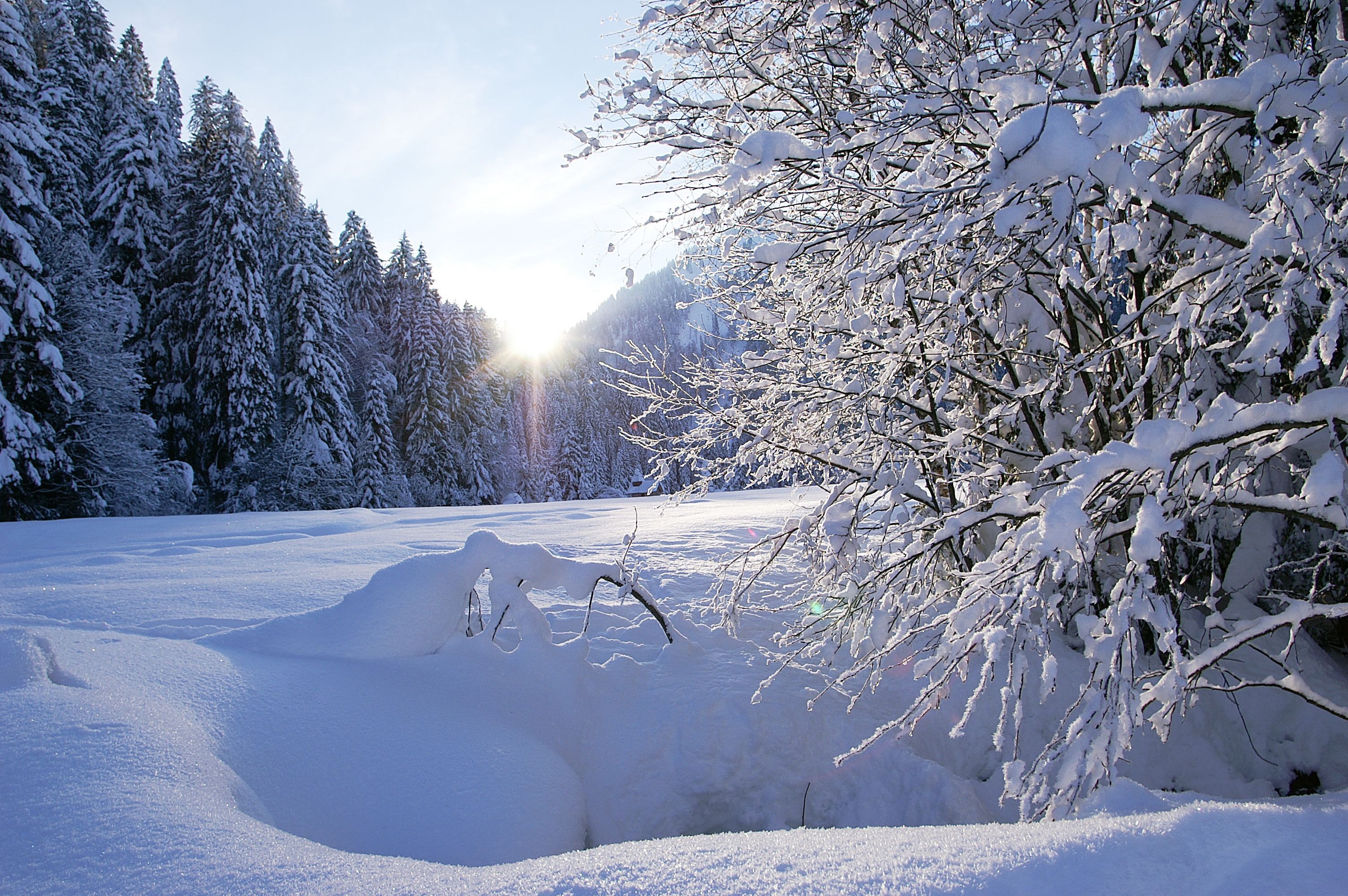 Ein Höhenwanderweg von Sibratsgfäll nach Schönenbach in Vorarlberg.